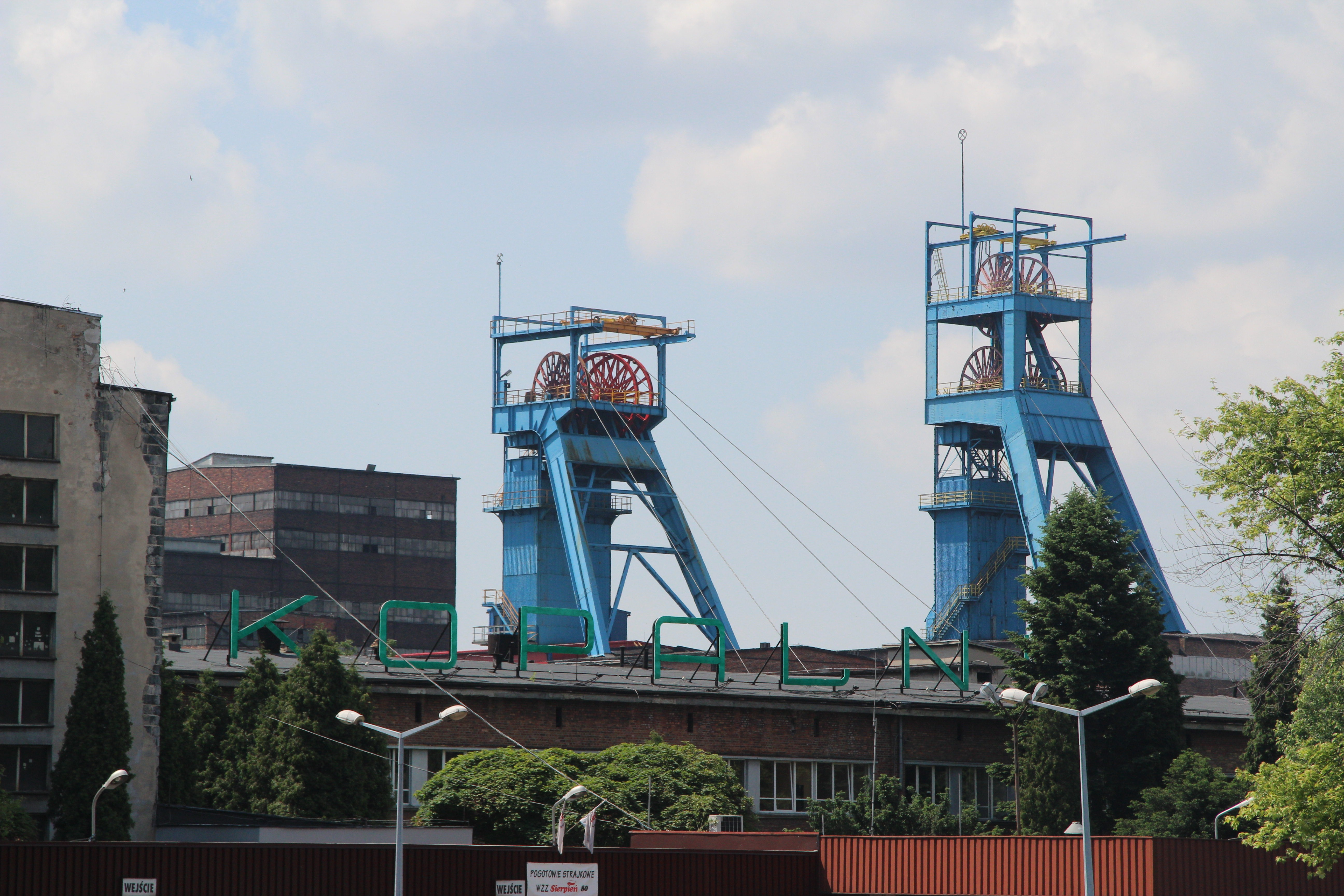 Kopalnia Węgla Kamiennego Mysłowice-Wesoła, wieże wyciągowe szybów Piotr (lewy) i Bronisław